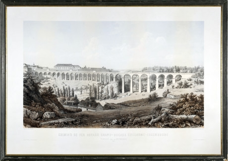 "Chemins de fer royaux grand-ducaux Guillaume-Luxembourg:Viaduc sur la Pétrusse"lithographie